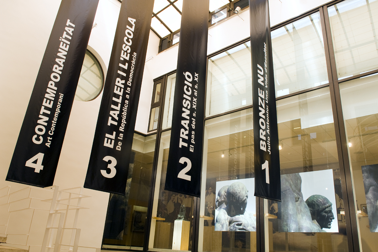 Fotografia interior del Museu d'Art Modern de Tarragona